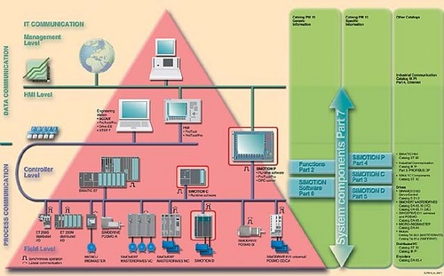 Automation engineering